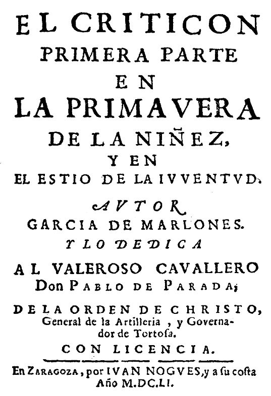 Baltasar Gracián, El Criticón, Zaragoza, Juan Nogués, 1651.